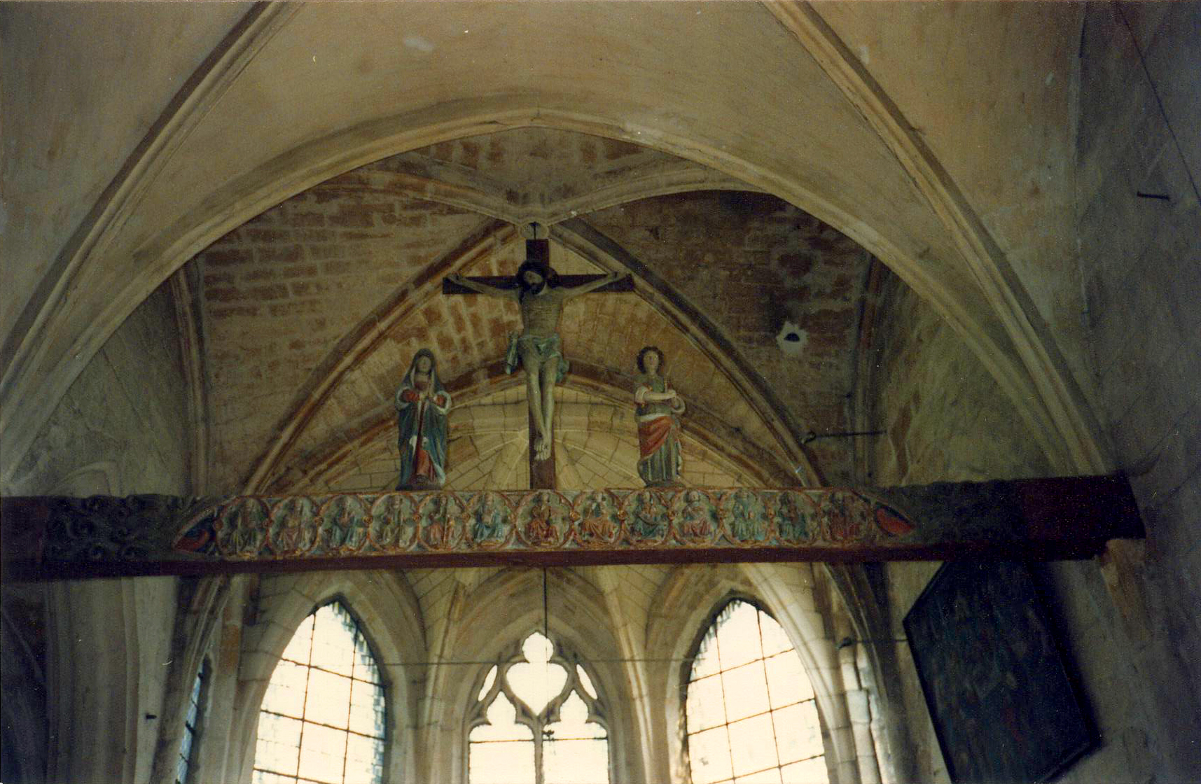 Septmonts (Aisne, France) - L'église Saint-André. La poutre de gloire. . .